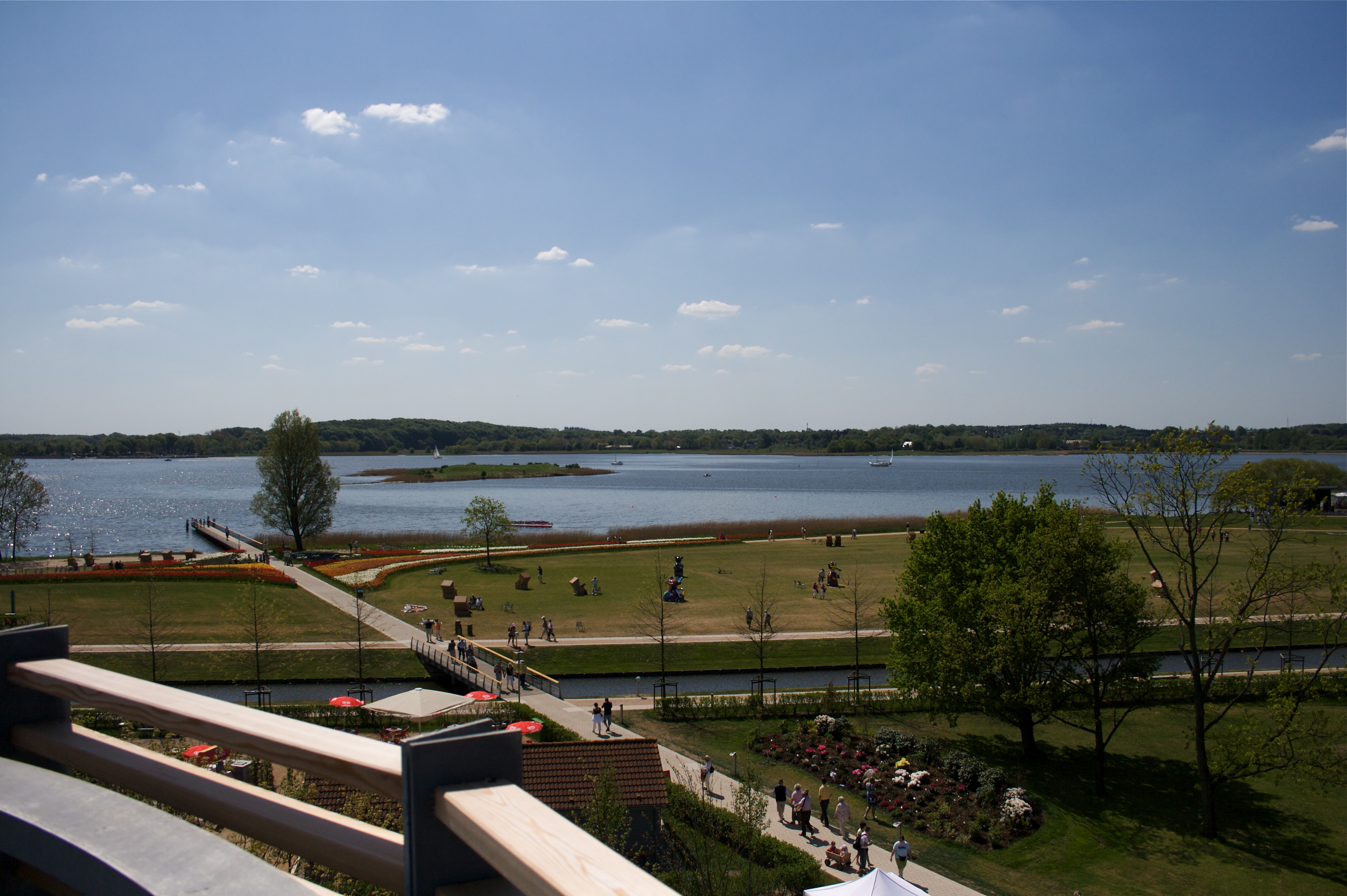 Landesgartenschau Schleswig 2008, Blick zur Möweninsel in der Schlei